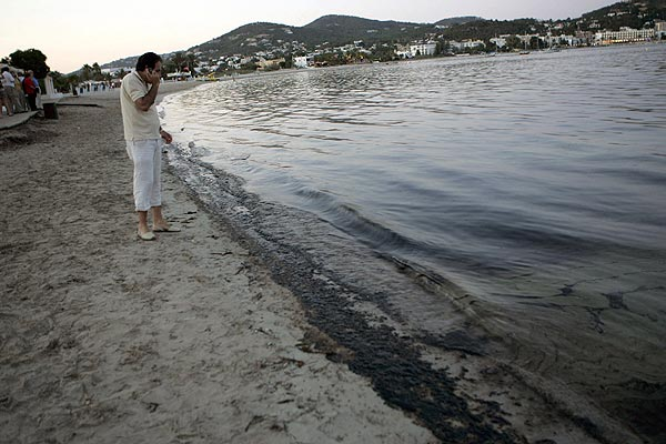 Platja de Talamanca amb els vessaments d'hidrocarbur del buc Don Pedro enfonsat l'11 de juliol de 2007